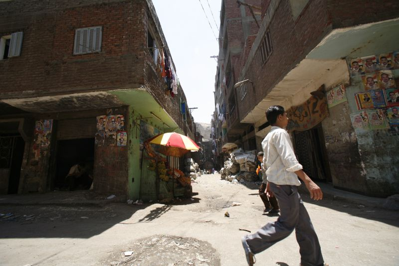 Египет. Каир. Квартал «Город мусорщиков». Типичная улица.